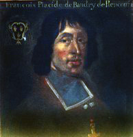 Portrait (peinture) de l'évêque Baudry de Piencourt